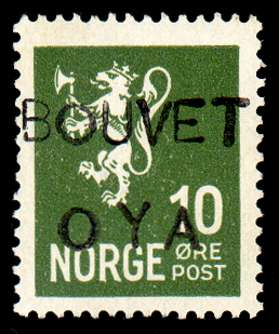 Почтовая марка Норвегии с полуофициальной надпечаткой "остров Буве", 1934